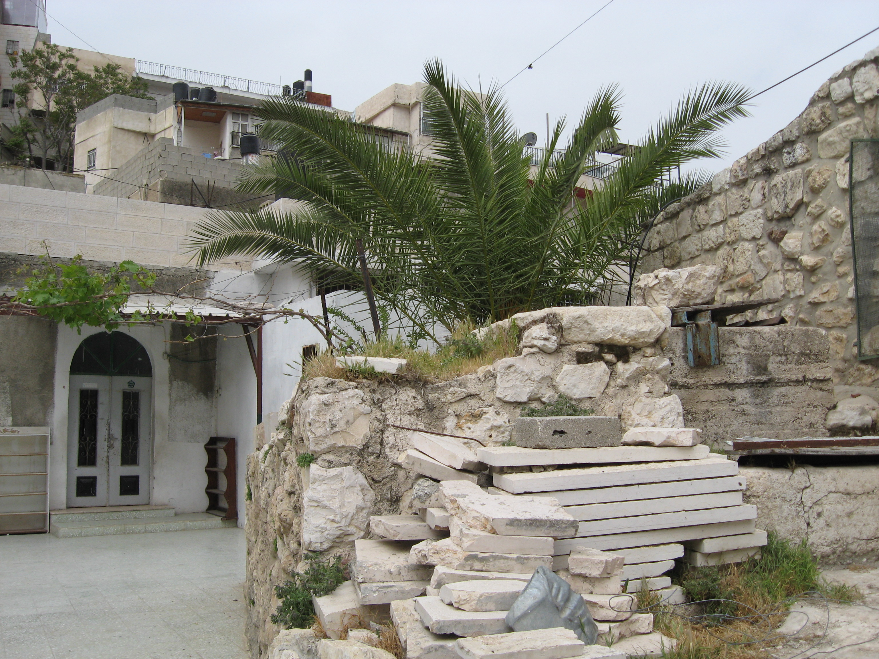 עין רוגל. הבאר (מימין) וחצר המסגד